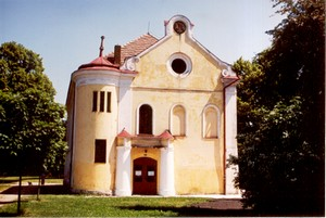 Česky: Synagoga v Novém Bydžově (nyní užívána ČCE)